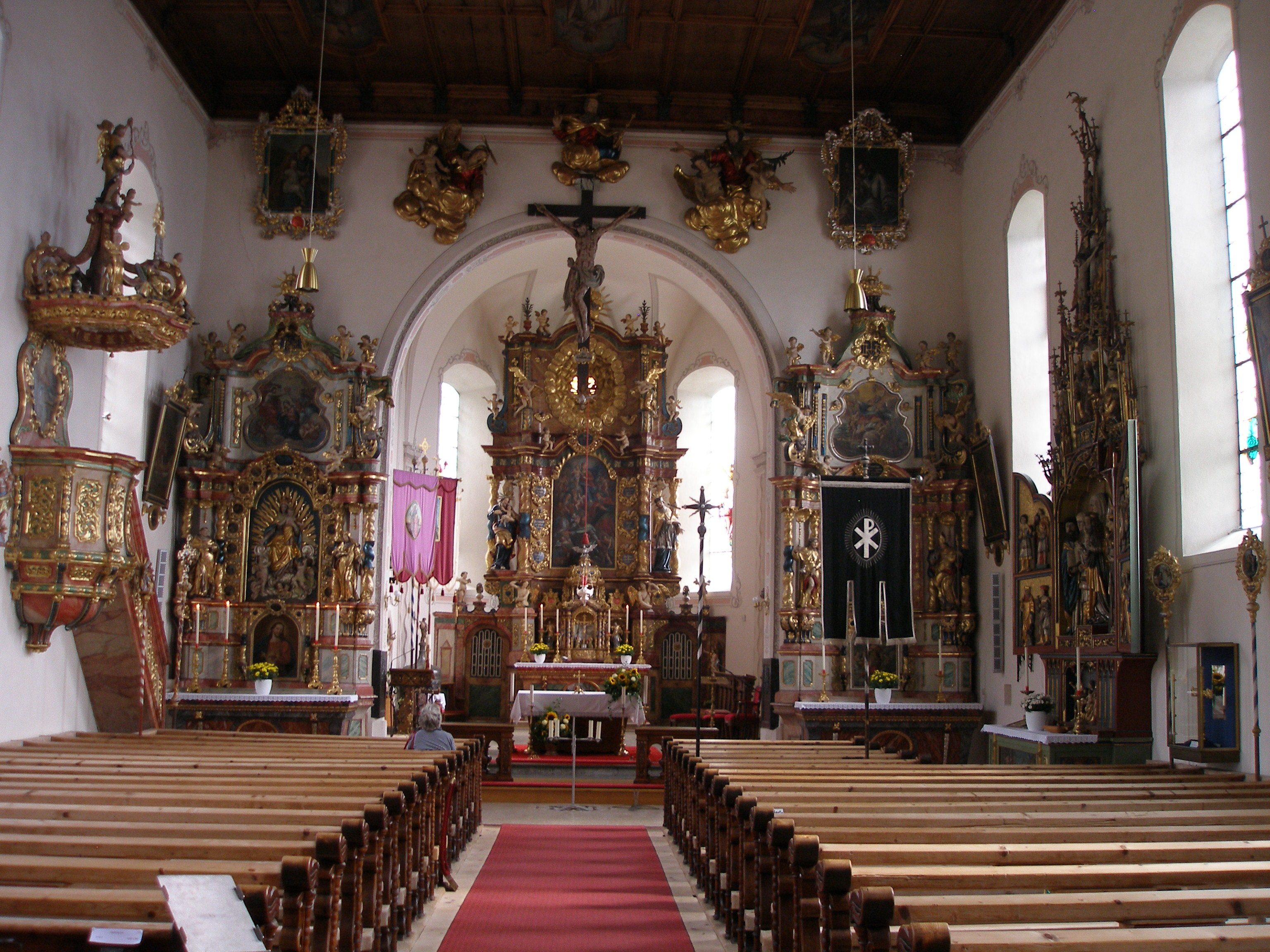 Pfarrkirche St. Bartholomäus (Bartholomäberg)